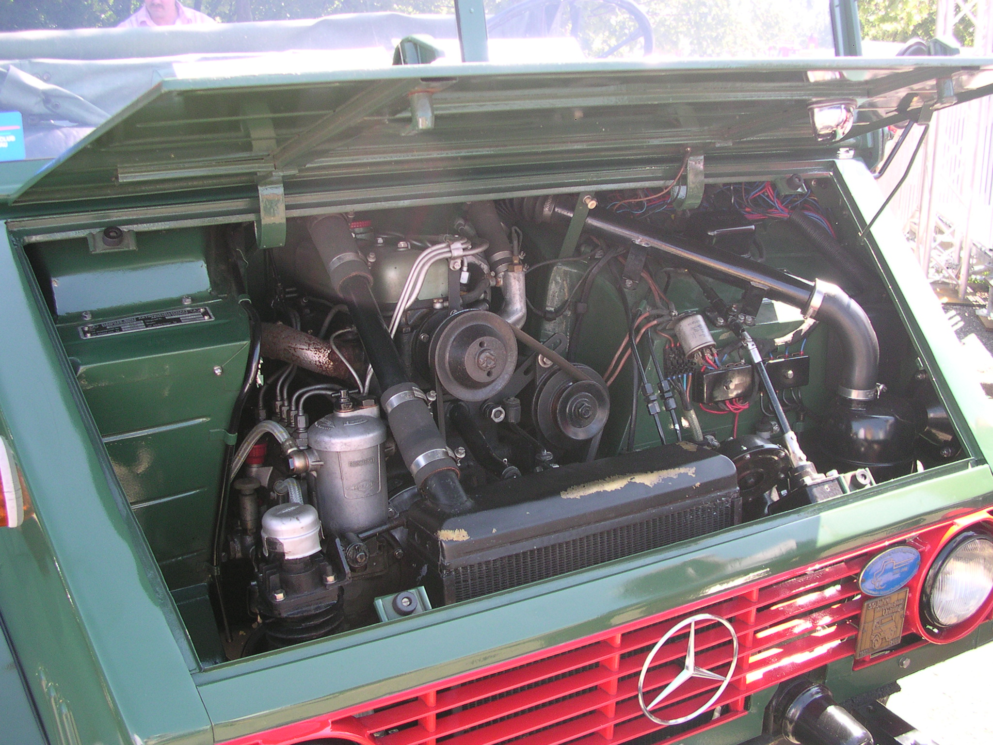 Großes Oldtimertreffen im Mercedes-Benz-Werk in Wörth am Rhein 2006; Unimog 401/411 mit Mercedes-Benz OM636 Dieselmotor.